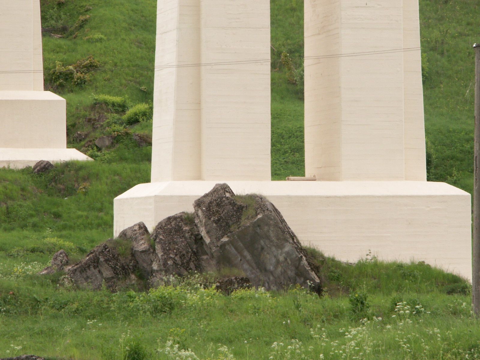 Eisenbahnbruecke in Lyduvenai, Ruinen der 1944 gesprengten Pfeiler